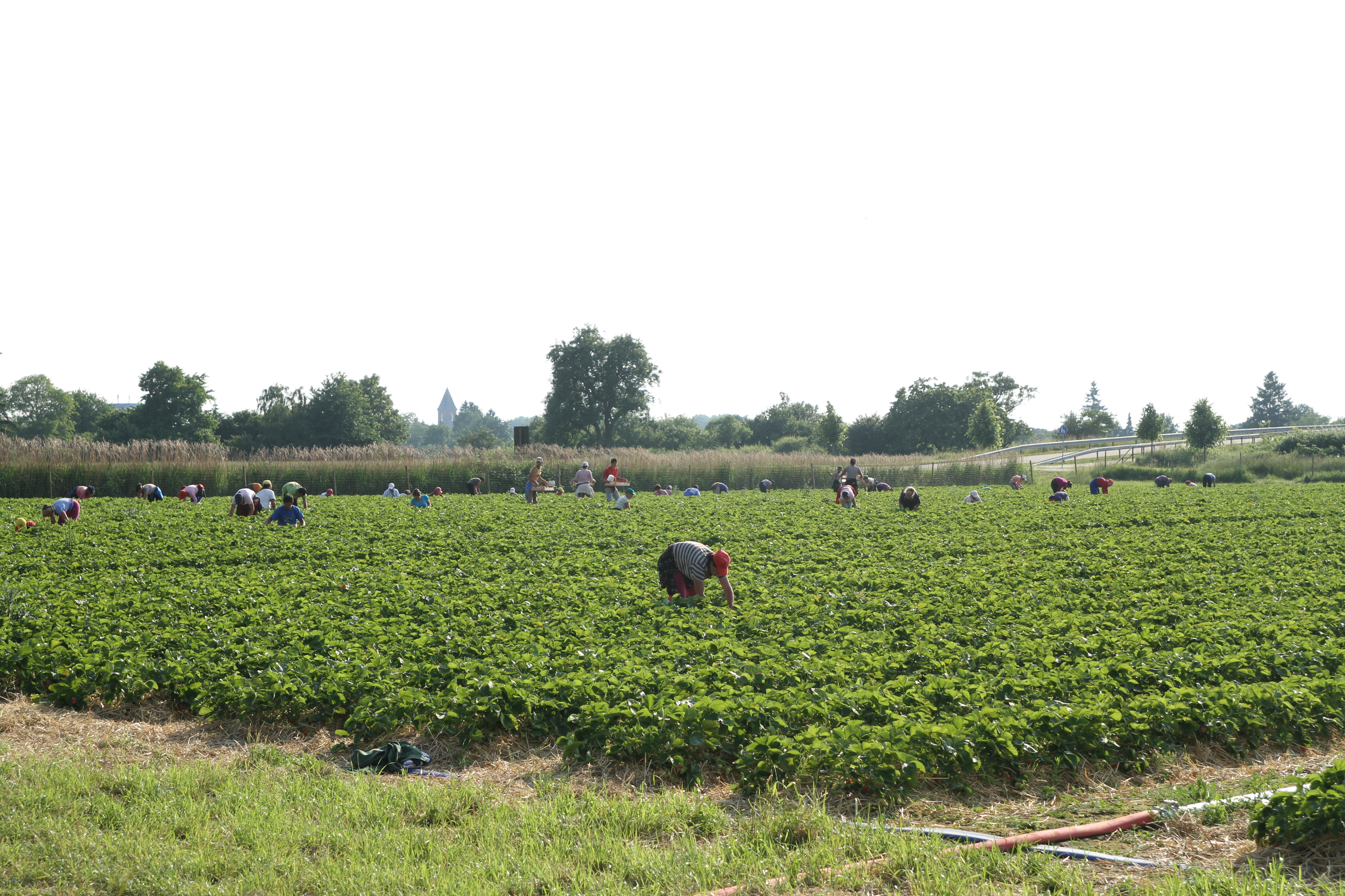 Erntehelfer bei der Erdbeerernte auf dem Durmersheimer Erbeerhof Enderle.